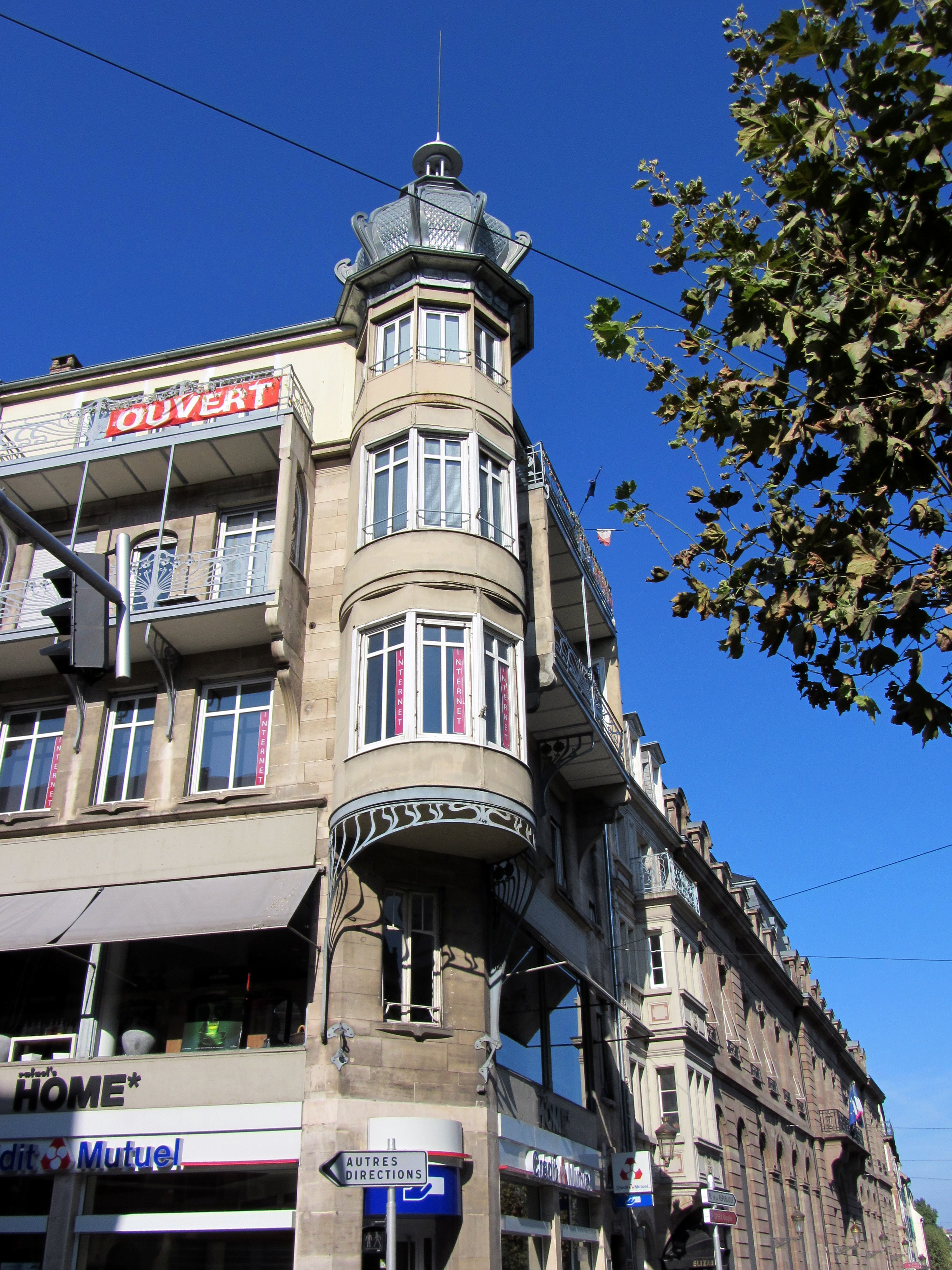 Les architectes Berninger et Krafft ont exploité l'implantation de l'édifice à l'angle de deux rues pour y faire saillir un oriel circulaire couvert d'un bulbe à côtes en "coup de fouet". À l'origine (1901), l'immeuble élevé pour le compte du tailleur H. Flach accusait un caractère Art Nouveau beaucoup plus prononcé, plus ou moins gommé au fil des rénovations. Source : dictionnaire de monuments historiques (La Nuée Bleue)